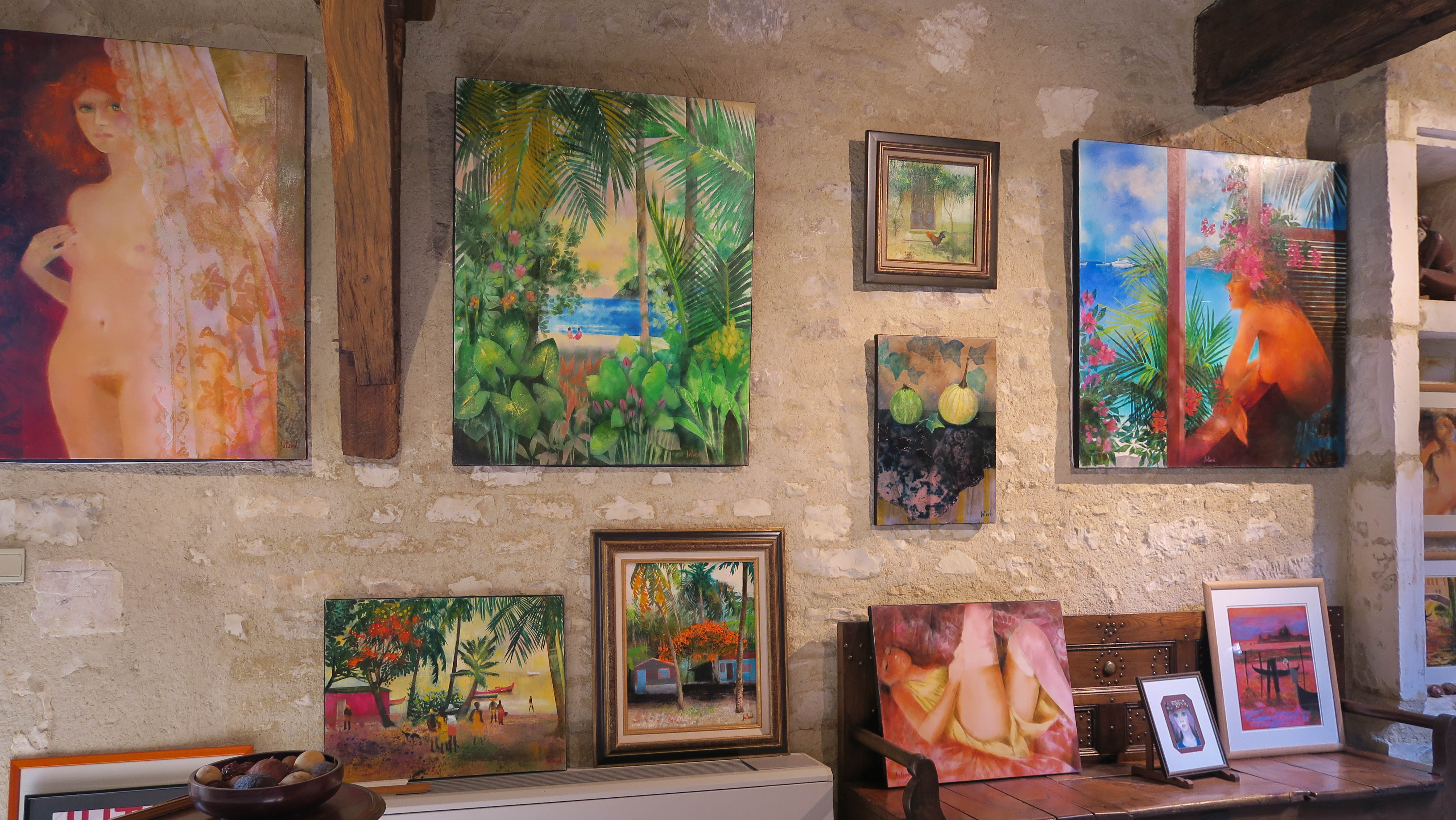 Tableaux de Pierre Jutand